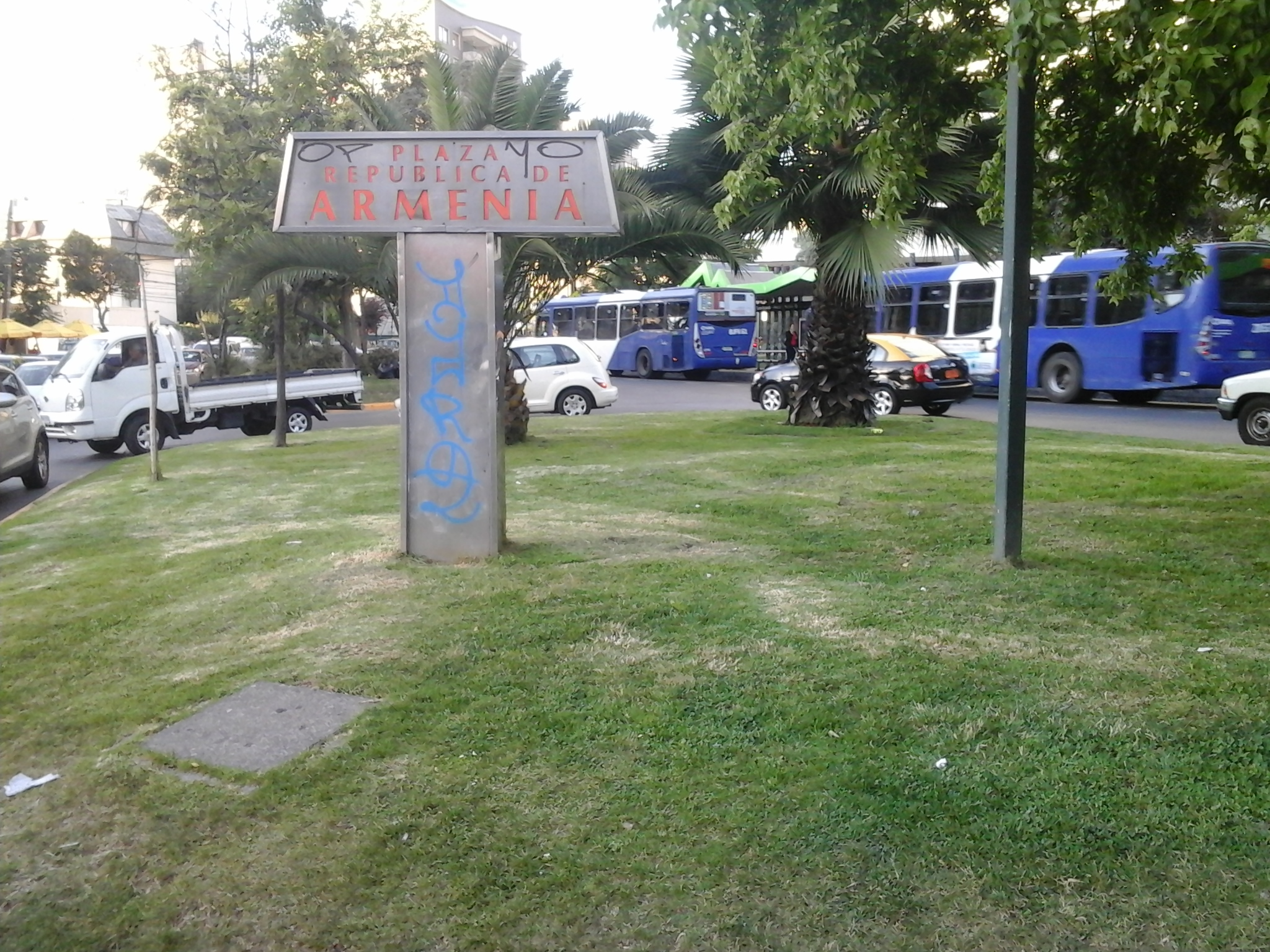 Plaza Armenia sector norte